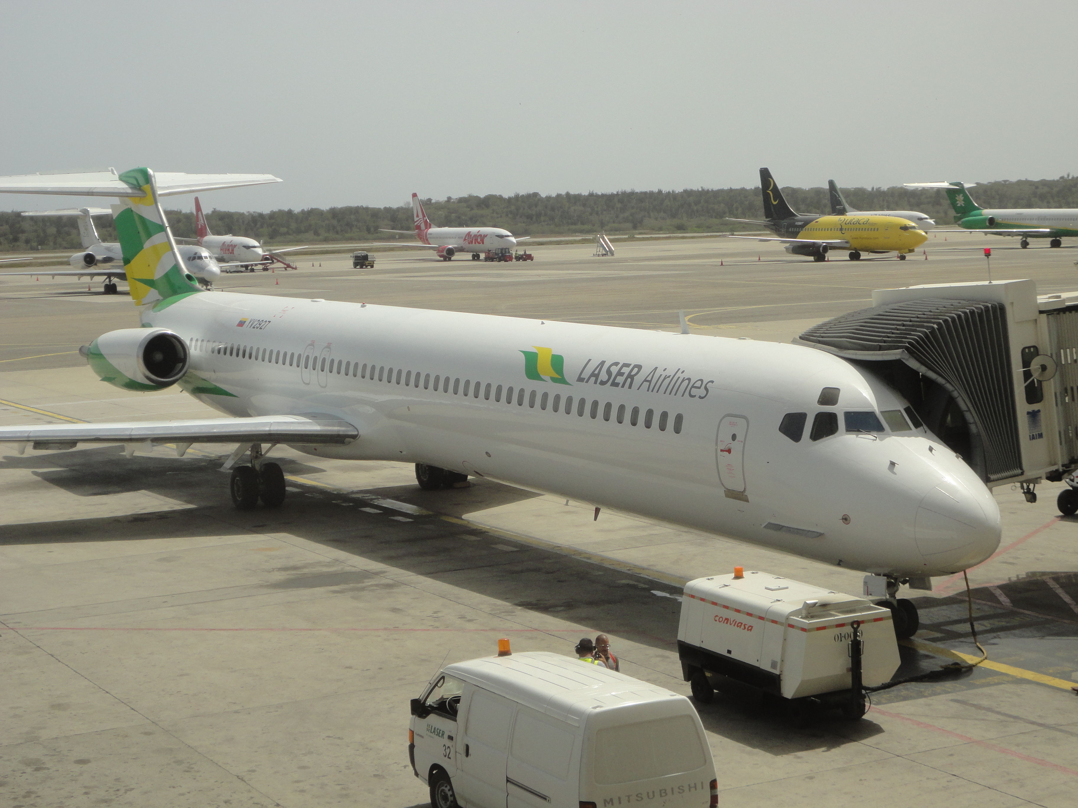 Aeronave MD82 YV2927 de LASER Airlines en el Aeropuerto de Maiquetía